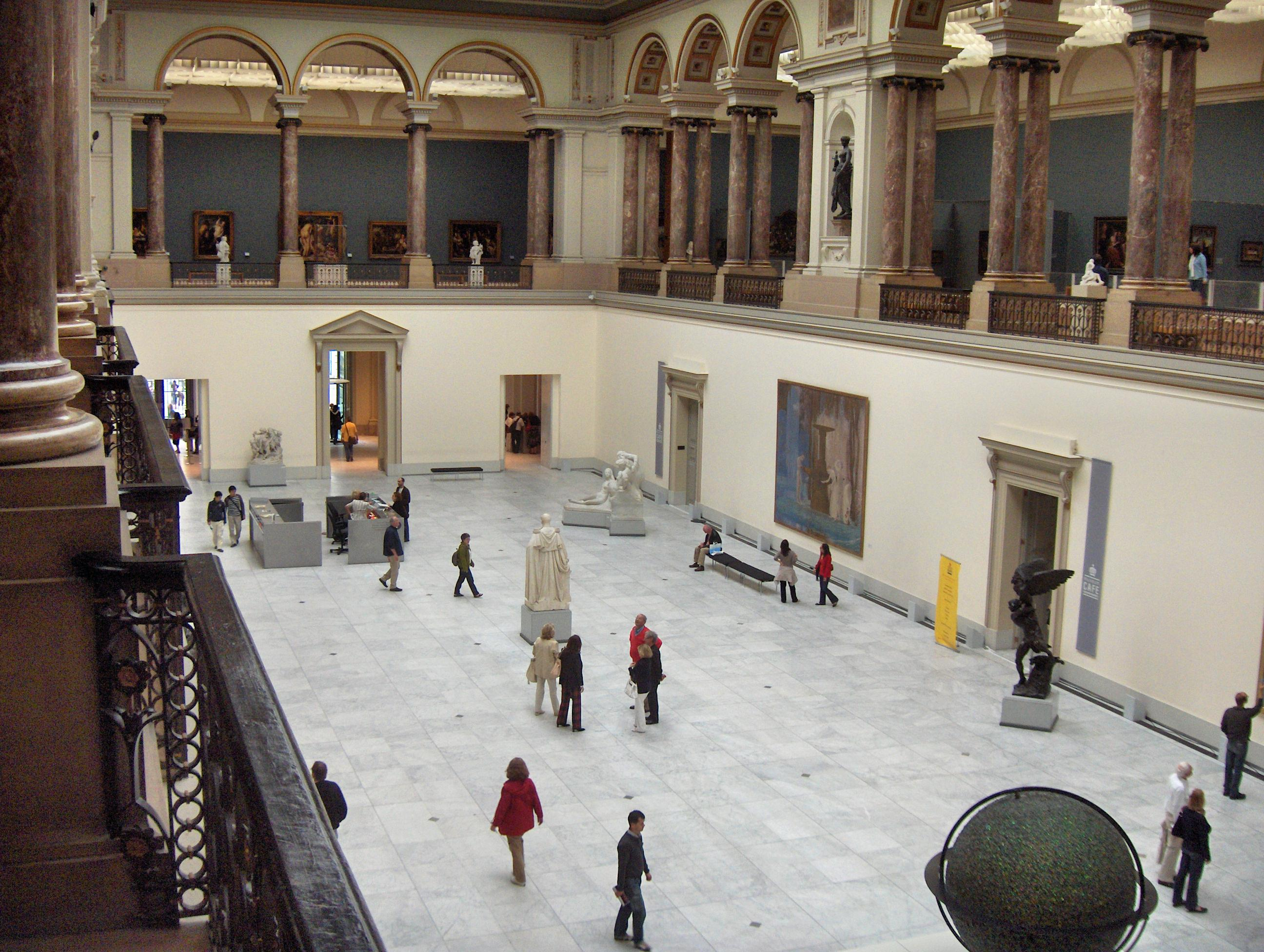 Zicht op de benedenverdieping van de KMSKB, Brussel